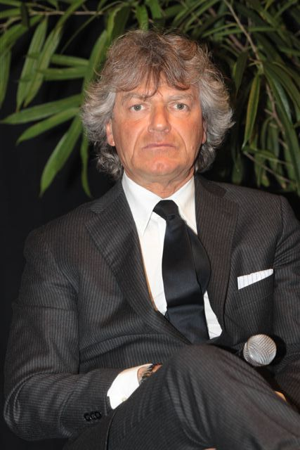 Giancarlo Antognoni (Marsciano, 1º aprile 1954) è un ex calciatore italiano, di ruolo centrocampista. Campione del mondo con la Nazionale italiana nel 1982.